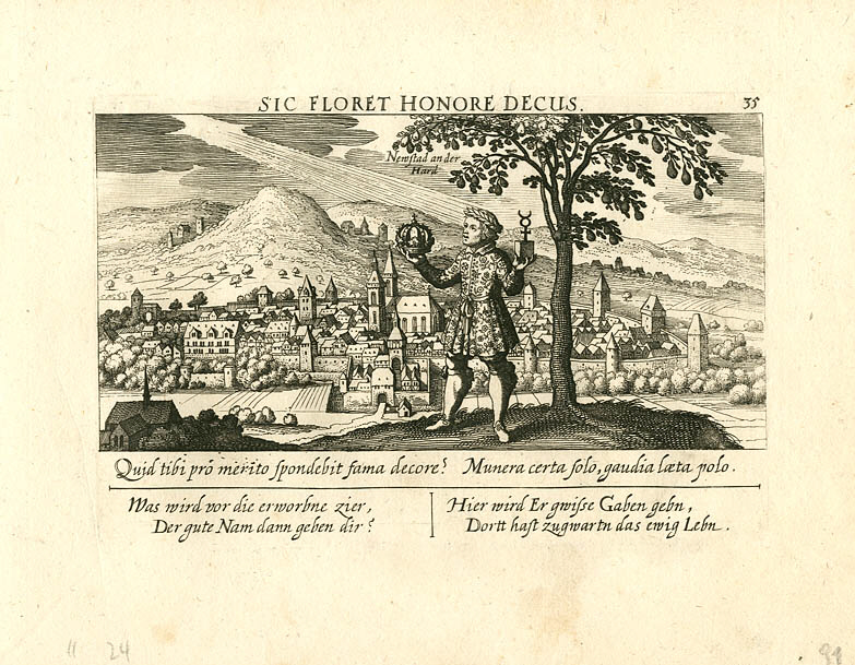 aus Daniel Meisner's Schatzkästlein Neustad an der Hard. Kupferstich aus Daniel Meisner’s Schatzkästlein. Ausgabe bei Eberhard Kieser, Frankfurt a. M., 1624.